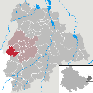 Lumpzig in Thuringia - District Altenburger Land